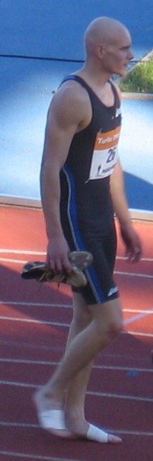 Timo Salonen Paavo Nurmen kisoissa, Paavo Nurmen stadionilla, Turussa, 24. kesäkuuta 2009